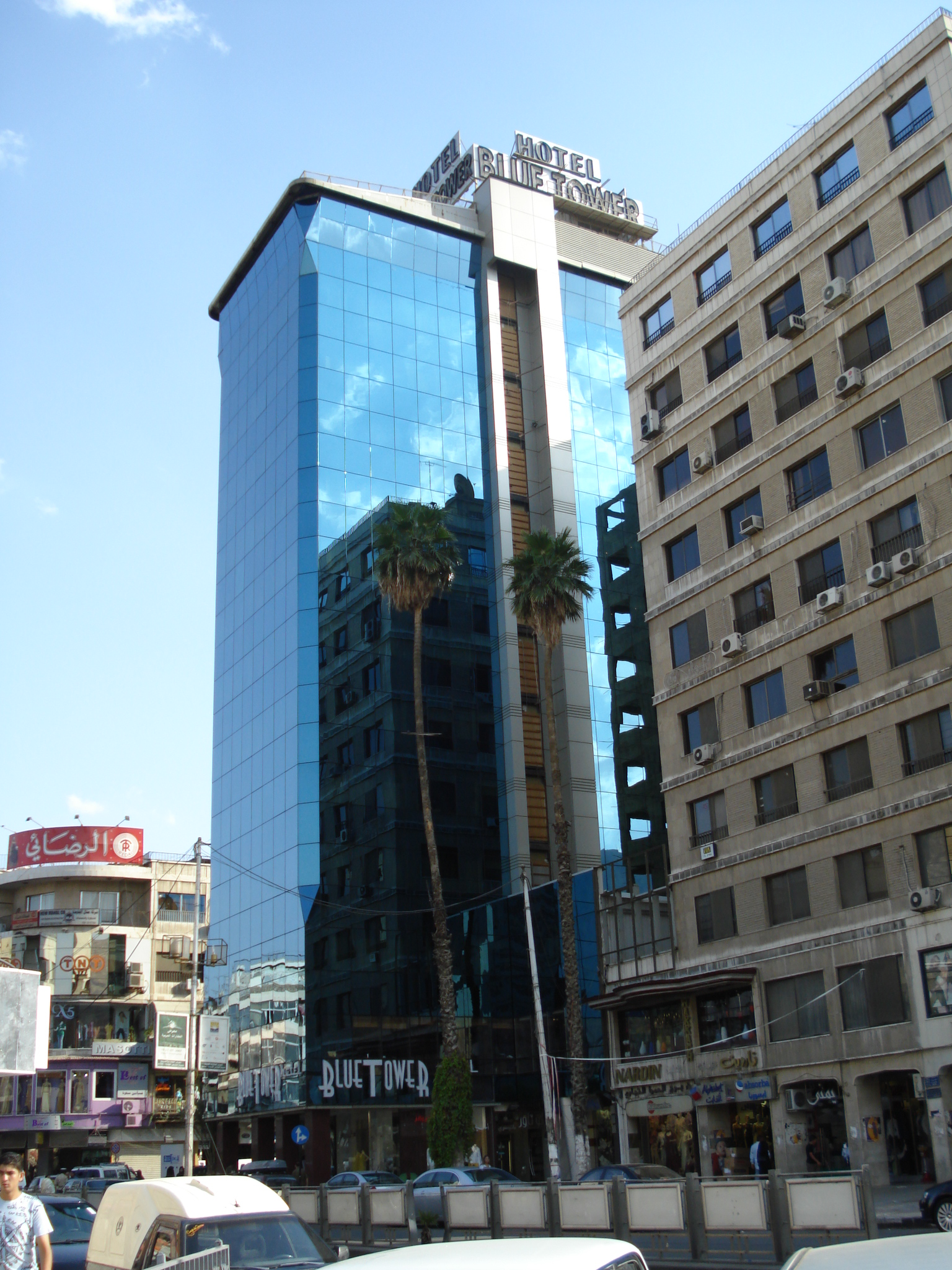 بلو تاور في شارع الحمراء التجاري وسط دمشق